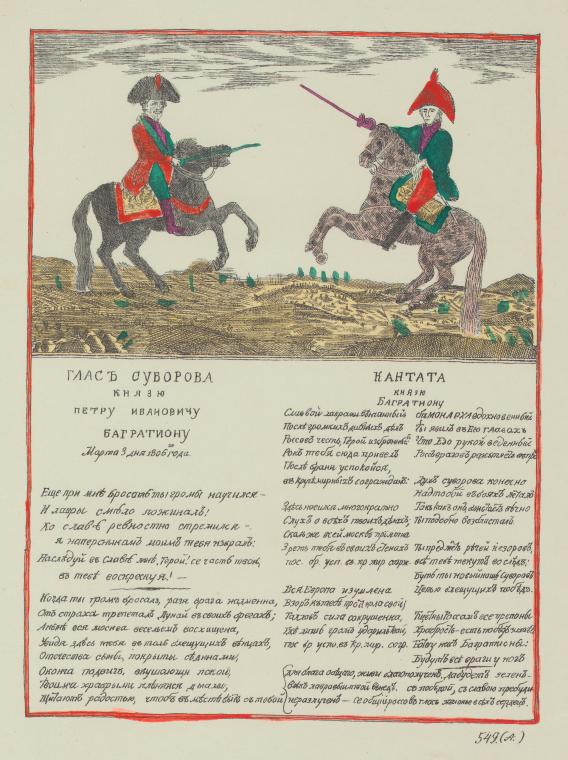 Kniaz' Italiiskii Suvorov i kn. Bagration.